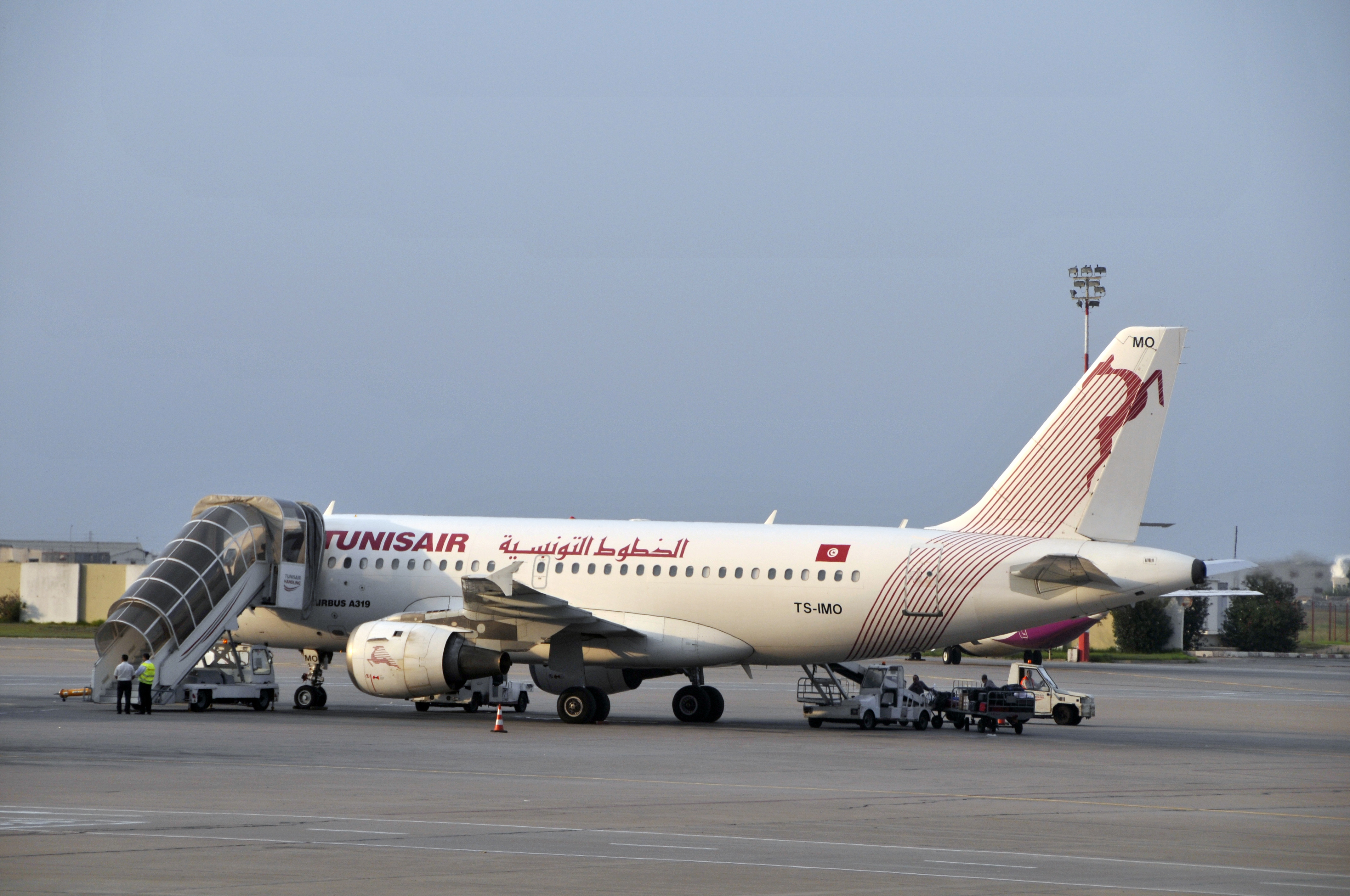 Un Airbus A319-ER de TunisAir, immatriculé TS-IMO, sur le tarmac de l'aéroport Tunis-Carthage.